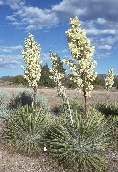 Yucca elata subsp. utahensis